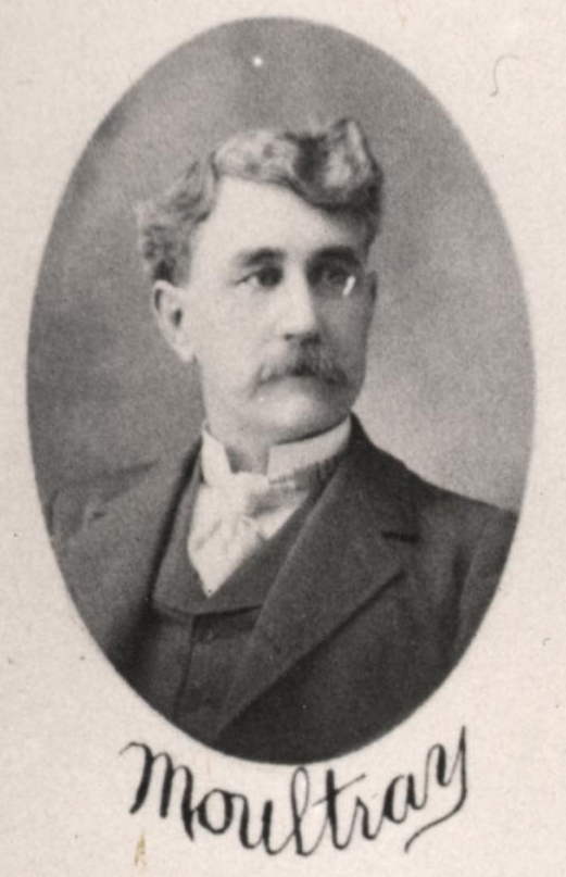 Sen Moultray